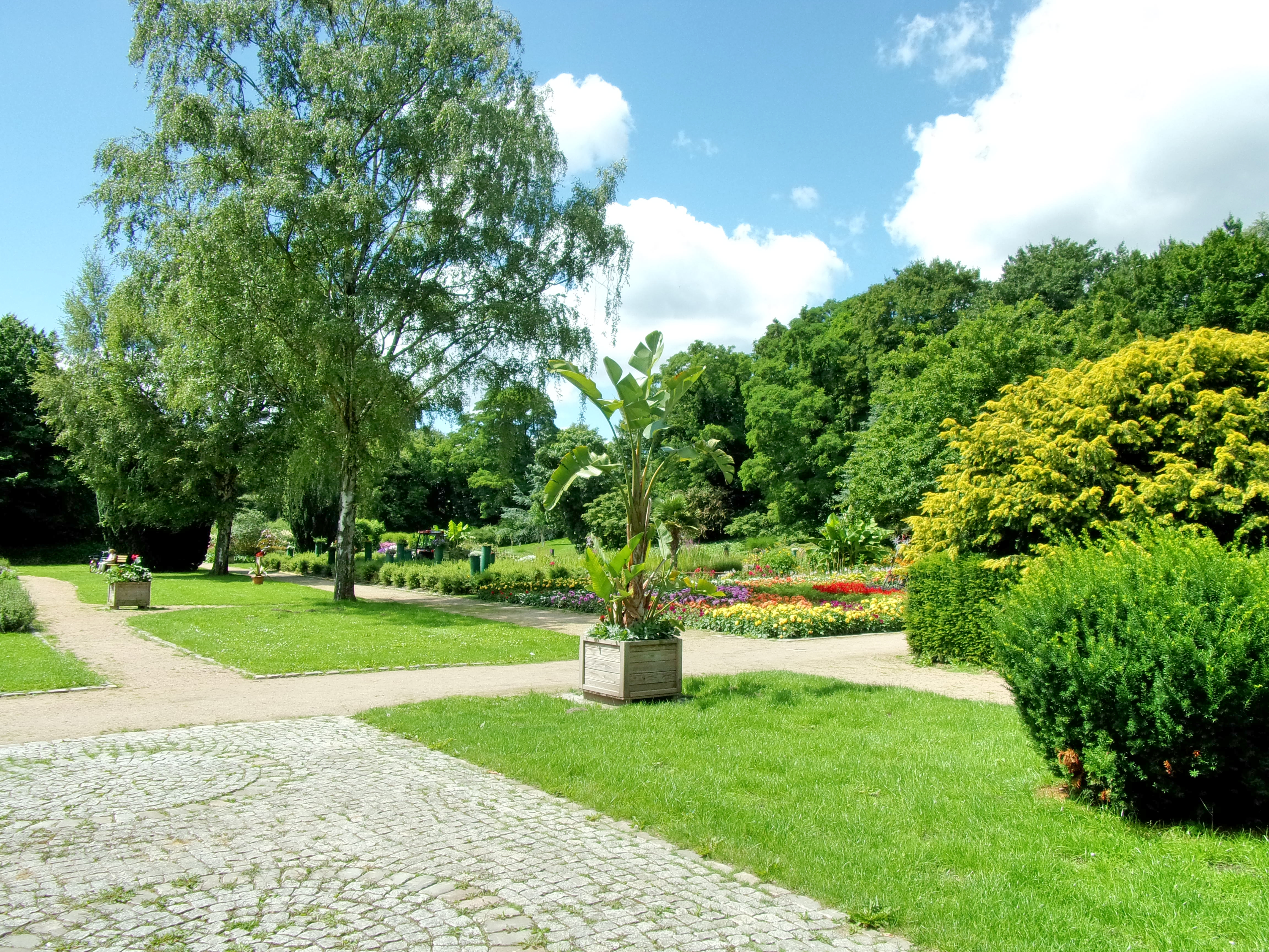 Der Botanische Sondergarten in Wandsbek befindet sich zwischen der Walddörferstraße Höhe " Am Schulgarten " und dem Ölmühlenweg. Auf einer kleinen Sonderfäche gibt es diverse Beete, Bäume und Pflanzen, meistens beschildert, anzuschauen. Außerdem ein Gewächshaus und Sitzmöglichkeiten innerhalb des Parks. Im Foto ein kleiner Ausschnitt der Gartenanlage mit Beeten und Wegen.